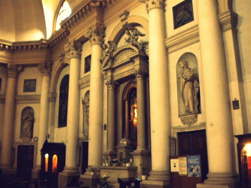 Interno della chiesa di Santa Lucia (altare con dipinto del Salvi) a Padova